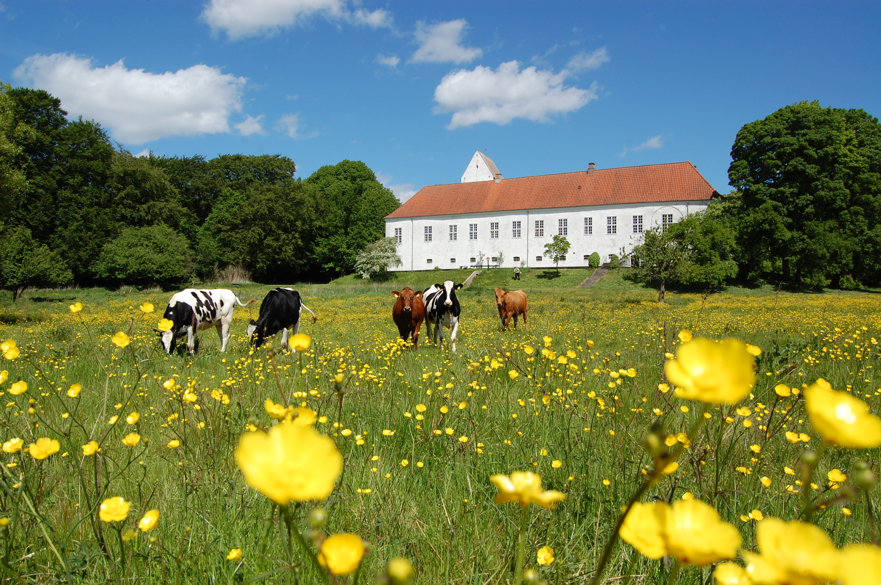 Det tidligere nonneklosters 3 hovedfløj består endnu gemt bag barokkens ombygning af tag og facader til en passende herregårdsanlæg. Her ses sydfløjen fra den ene af flere enge, som omgiver klosteret idag.